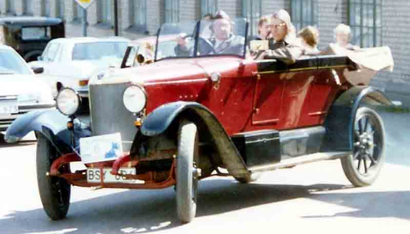 Selve SL 6/24 PS Doppelphaeton 1920